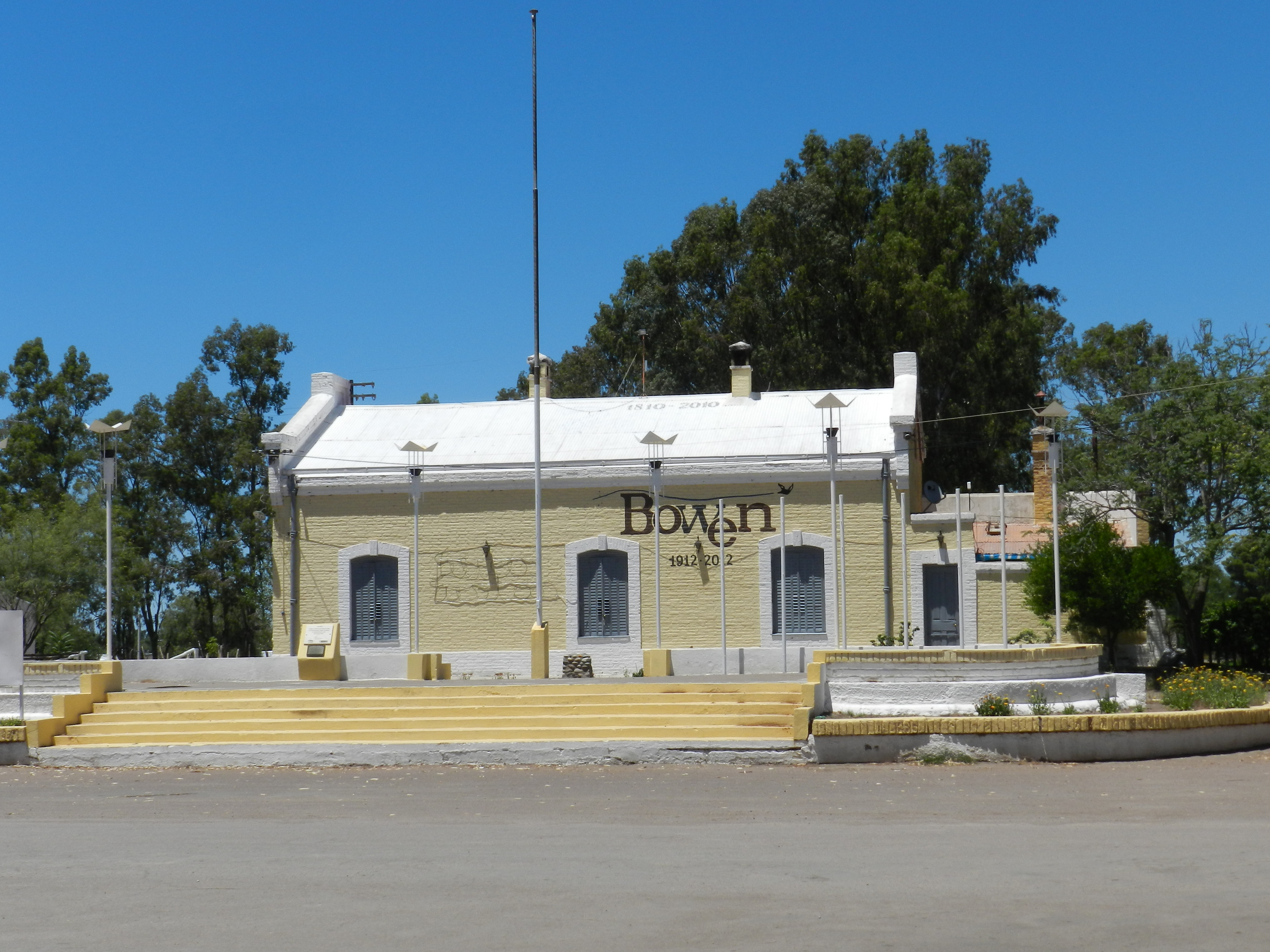 Estación ferroviaria de Bowen